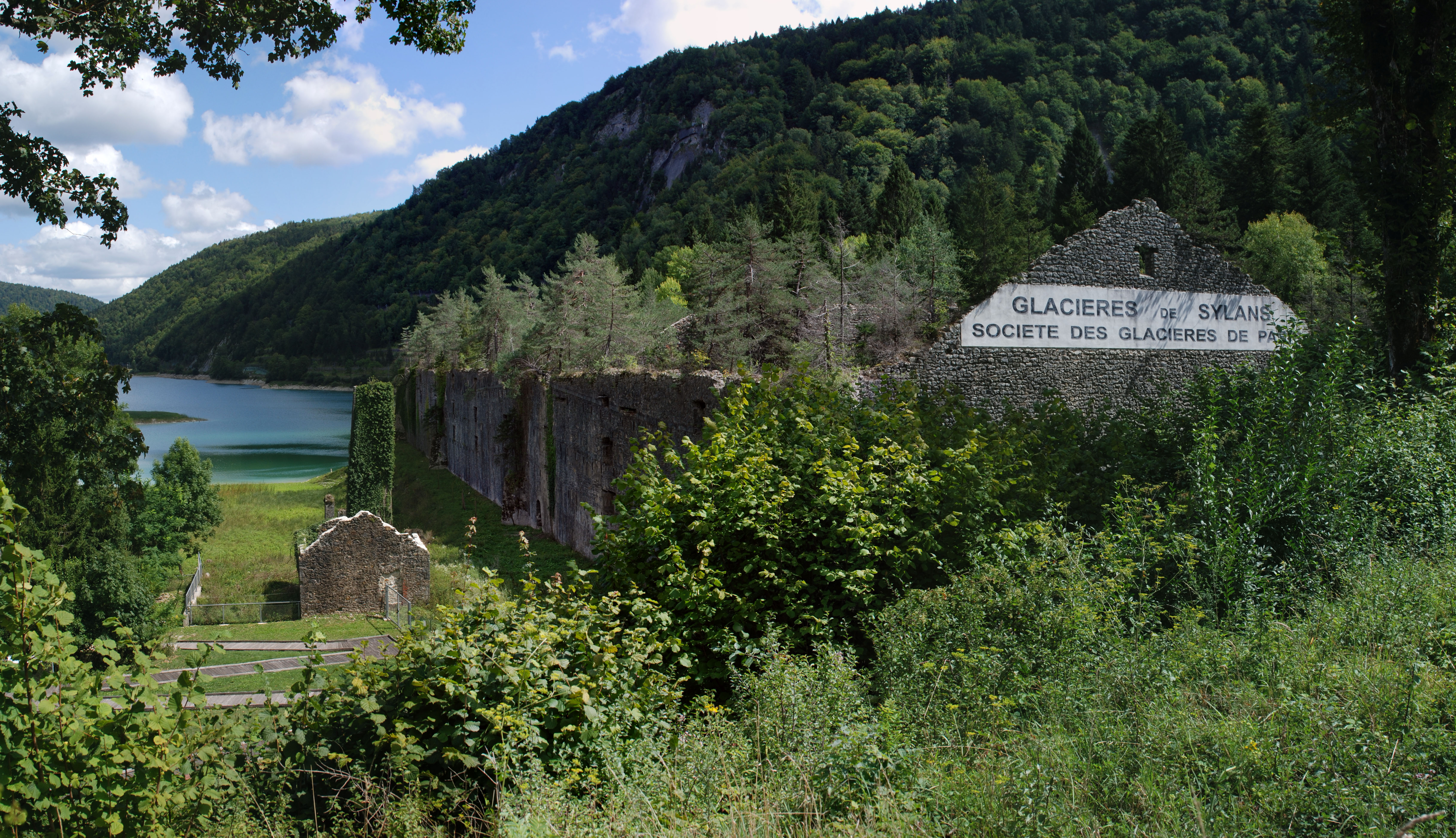 Eisfabrik Glacières de Sylans, Sylans.